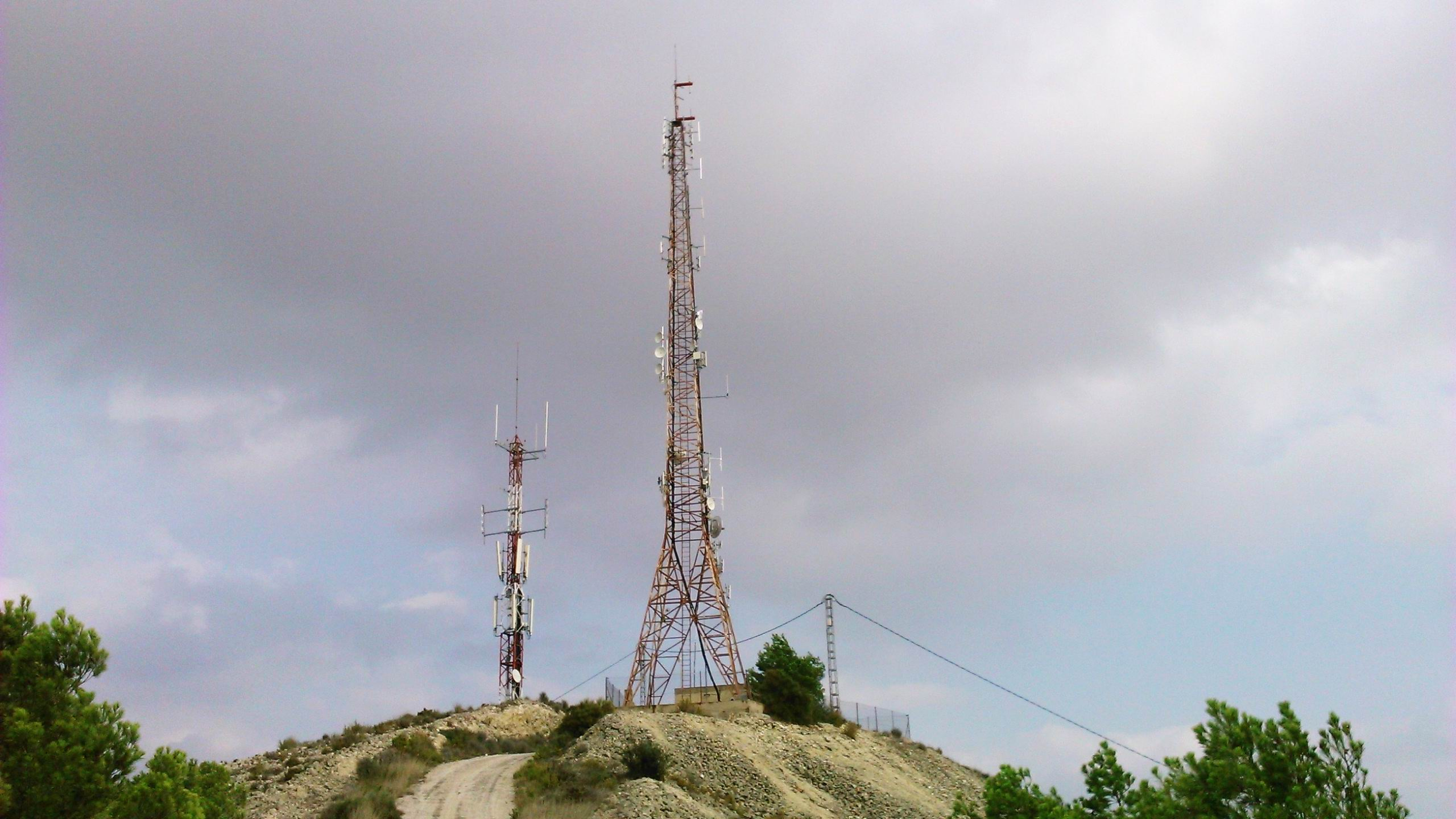 Antenas de radio. La Torreta. Elda